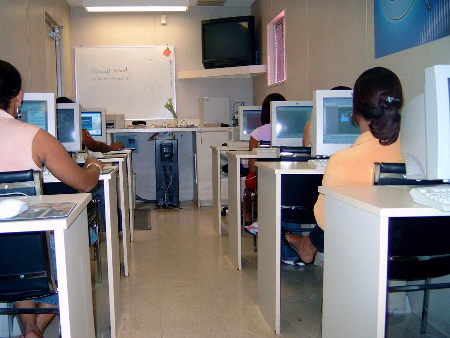 Aulas Virtuales para la Enseñanza (AVE) ejecutado en el 2001, es un espacio externo con 10 computadores, utilizados para la integración TIC en las áreas curriculares por igual cantidad de alumnos. Desde sus inicios este espacio ha servido para la capacitación básica de los docentes en el uso del computador y otros recursos informáticos.